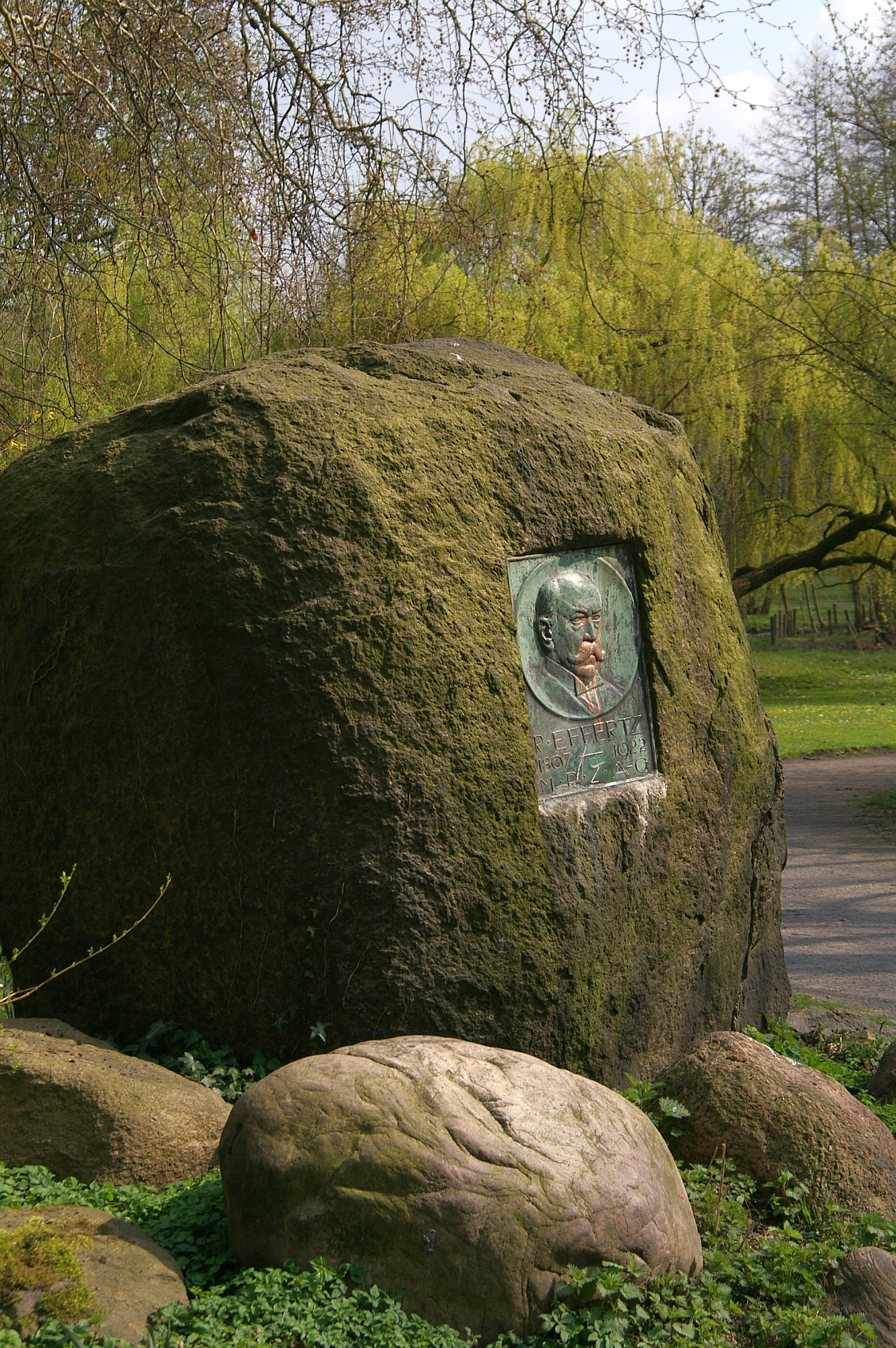 Effertz-Denkmal im Kurpark Unna vor der Umgestaltung im Jahr 2009. Reinhard Effertz (1848 – 1930) leitete als Generaldirektor die Königsborner AG für Bergbau, Salinen und Solebadbetrieb. Stadtverordneter in Unna von 1881-1898.